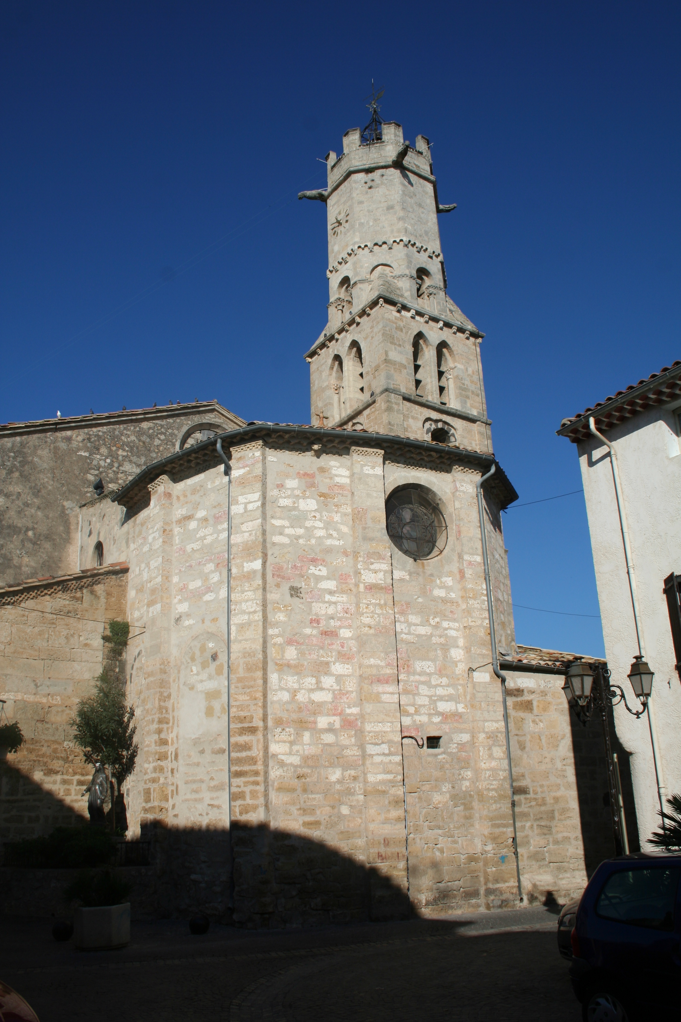 Villeneuve-lès-Béziers (Hérault) - chevet de l'église Saint-Étienne.